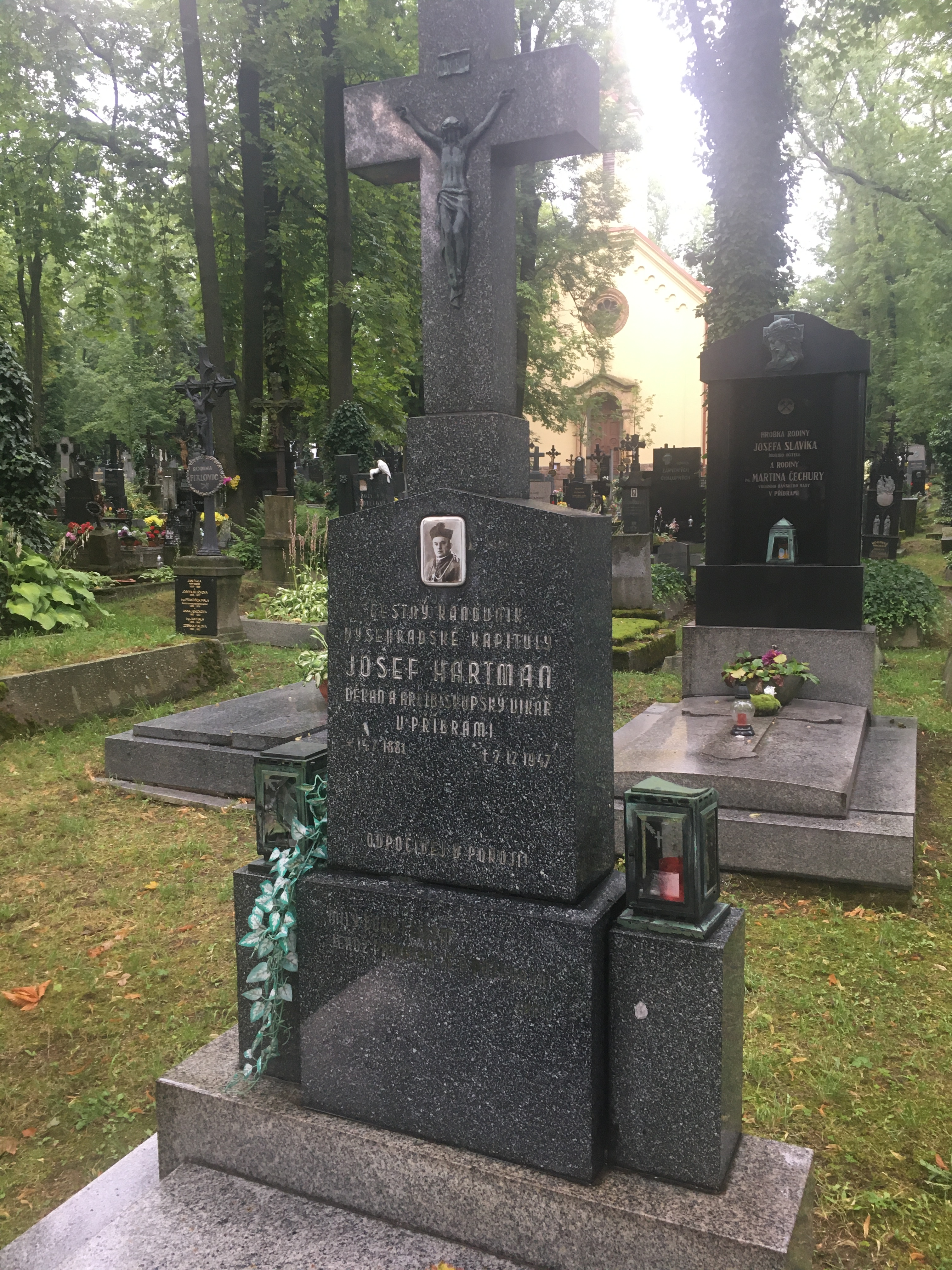 Hrob příbramského děkana Josefa Hartmana